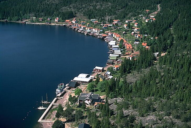 Motiv: Ulvöhamn Nyckelord: Flygbilder, Riksintressen, Världsarv Kategori: Fiskeläge Ulvöhamn